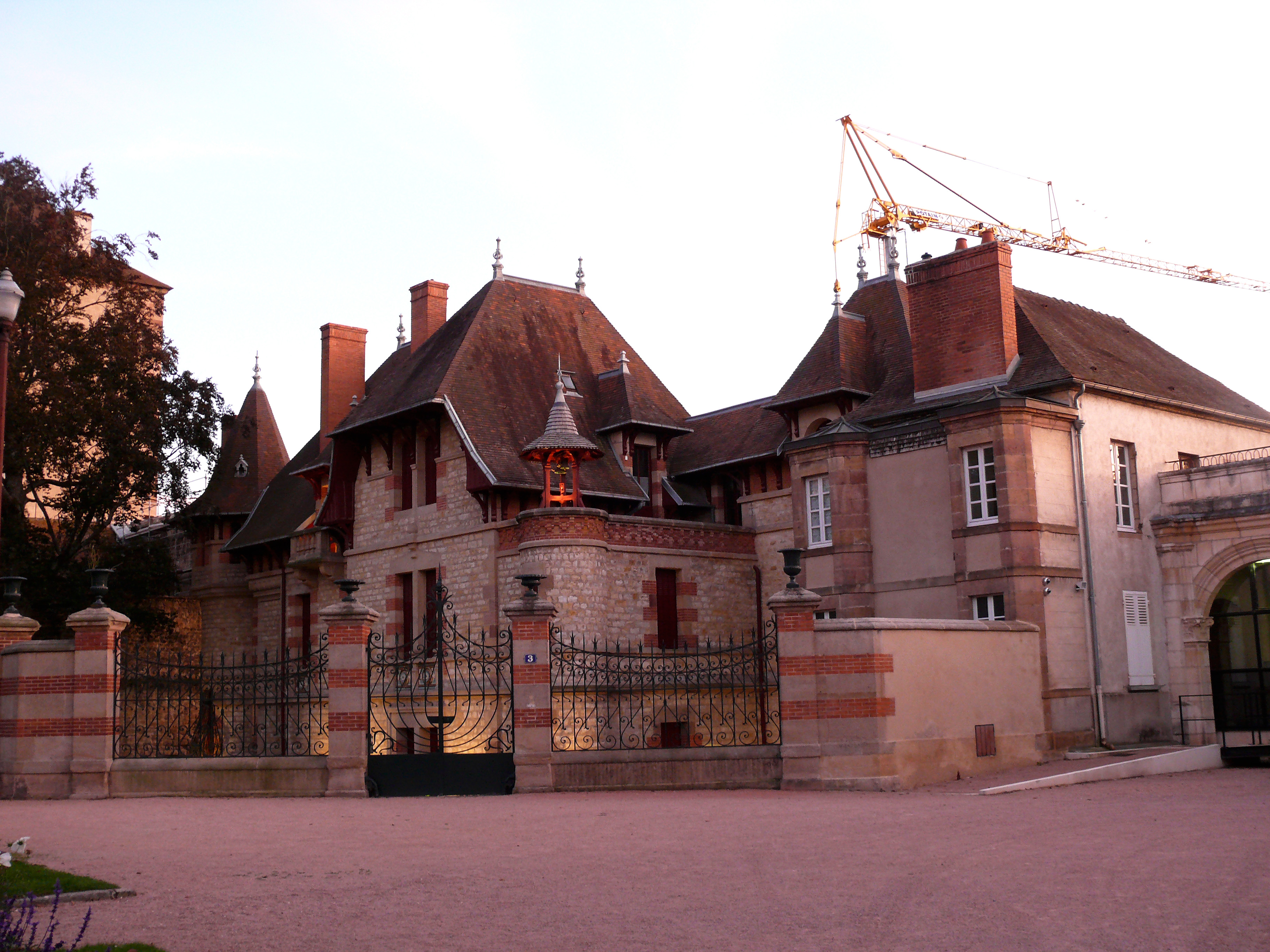 Maison Mantin - Moulins .